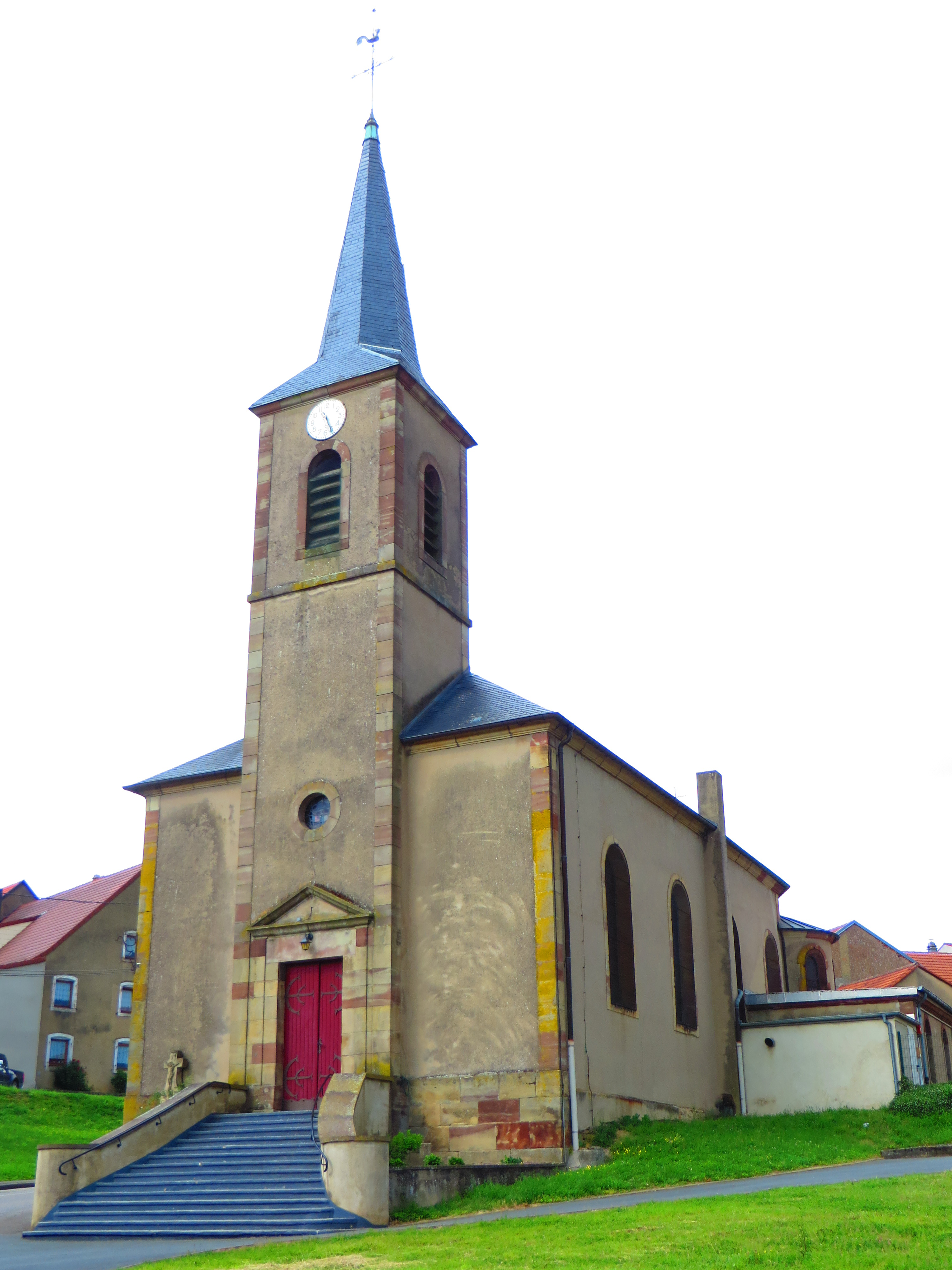 Metzing Église Saint-Hippolyte